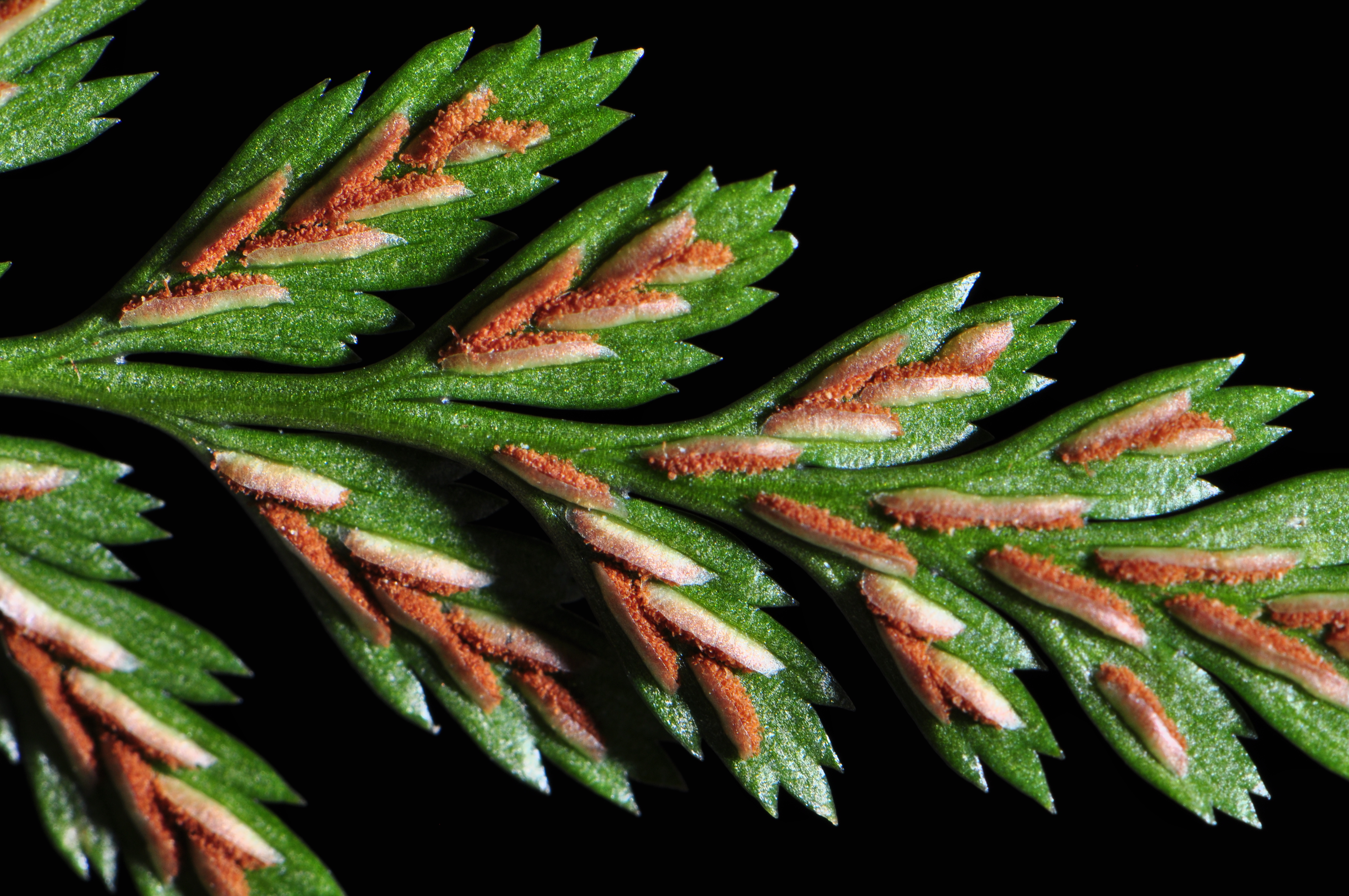 sori di Asplenium adiantum-nigrum